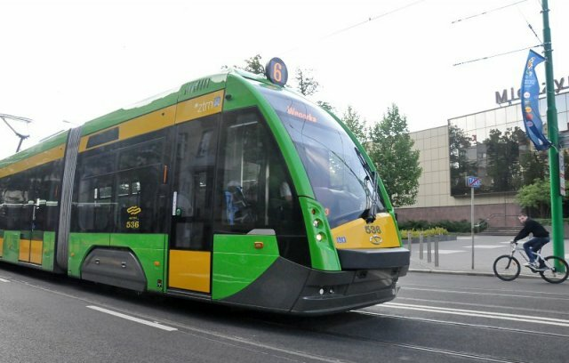 Solaris Tramino z logo ZTM Poznań na ulicy Grunwaldzkiej.